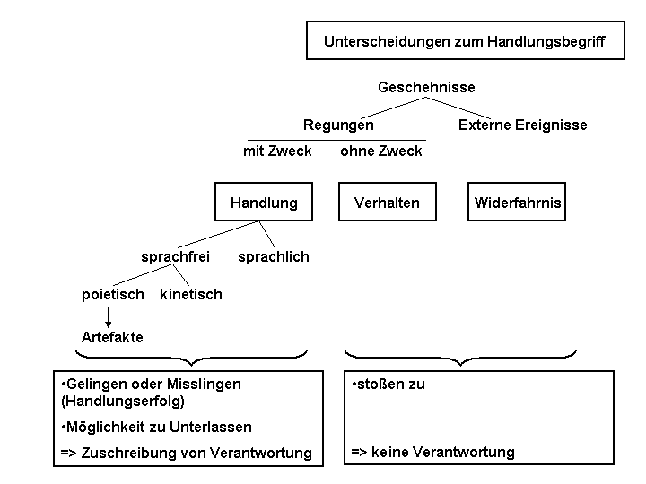 Graphische Übersicht zu den Unterscheidungen zum Handlungsbegriff im Methodischen Kulturalismus